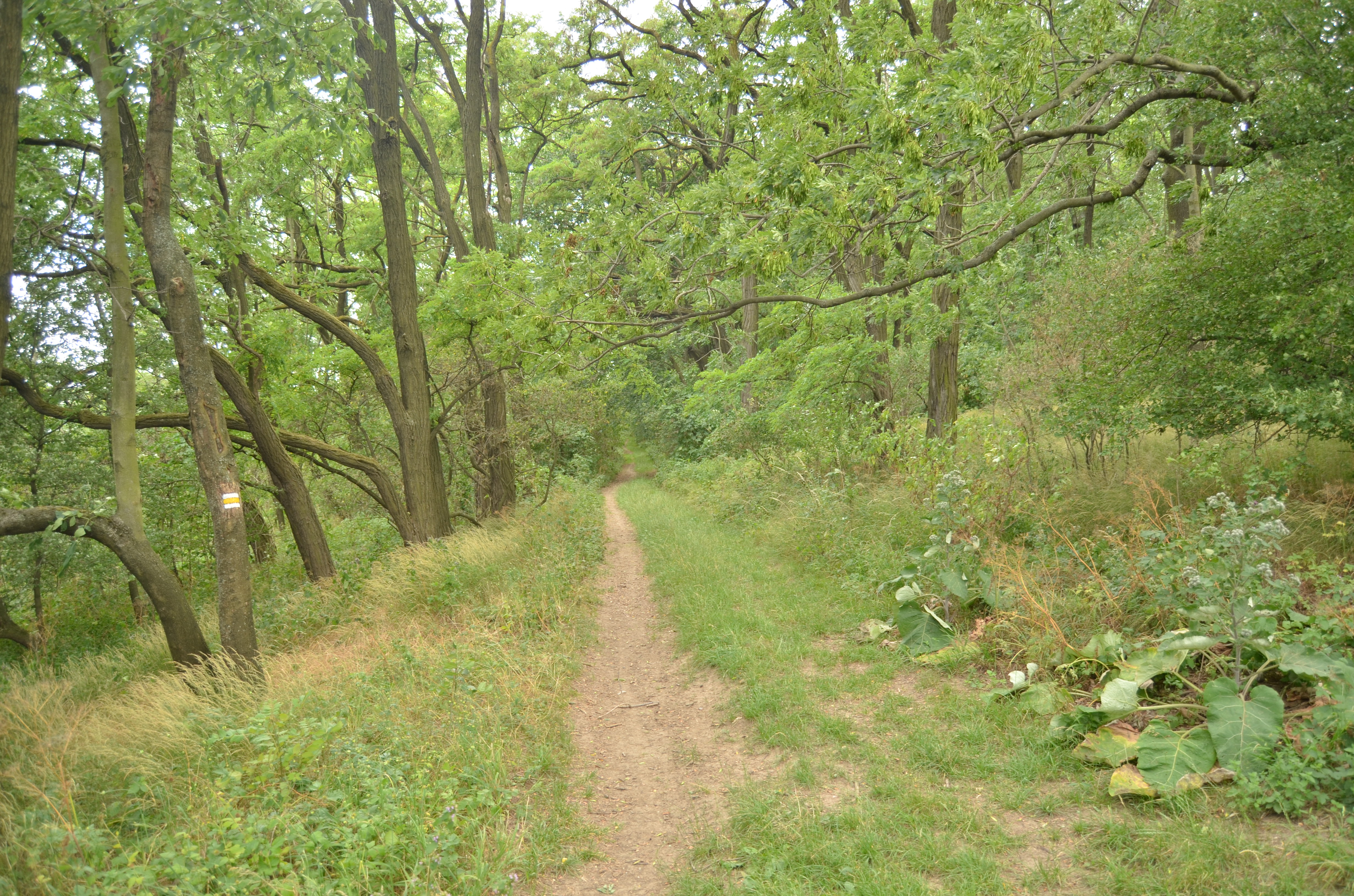 Lesík na kopci Švédské šance